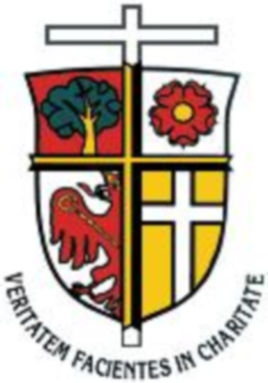 Wappen Alois Kothgassers als Bischof von Innsbruck (1997-2002)